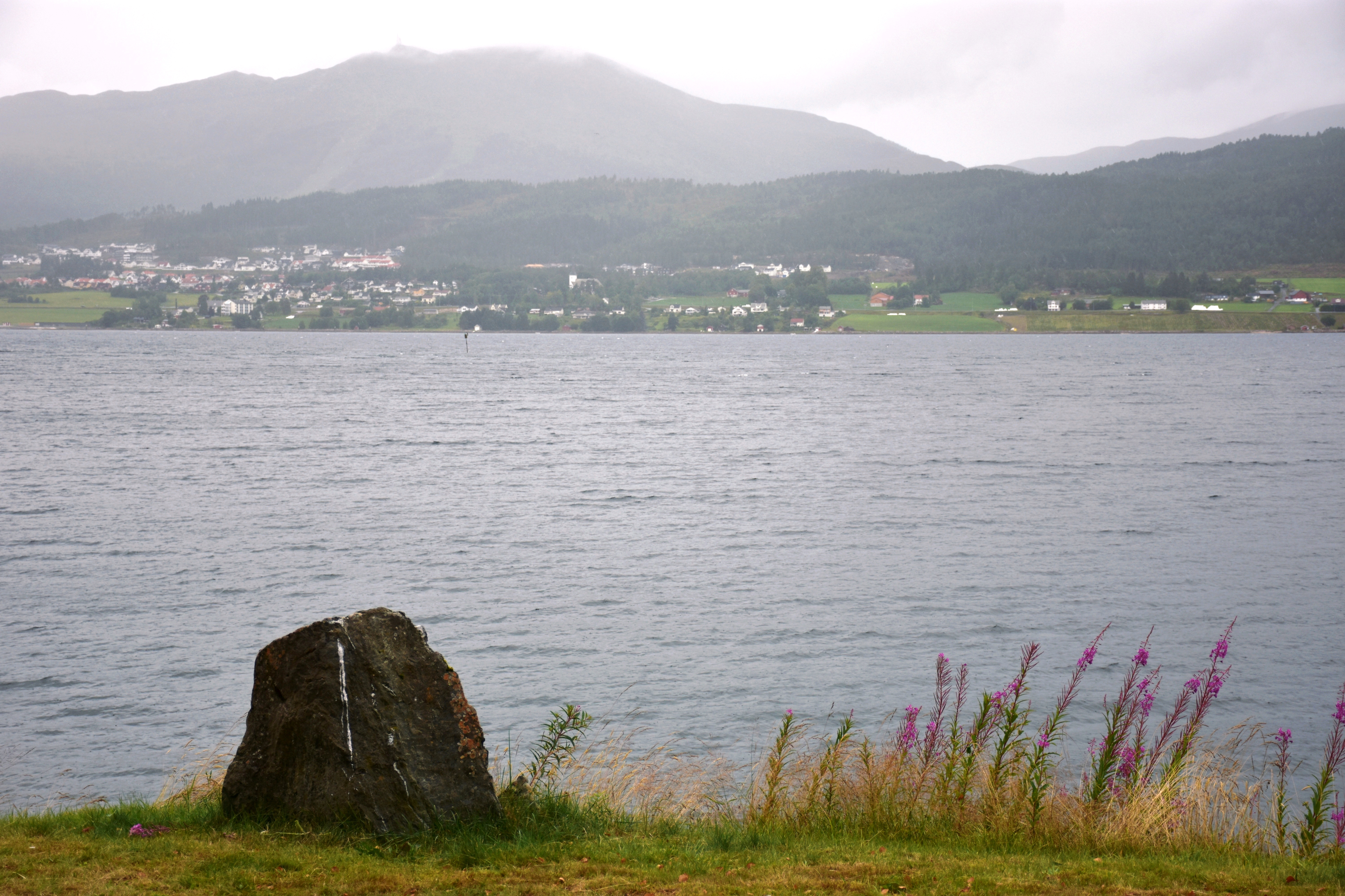 Utsikt mot Fannefjorden fra Bolsøya